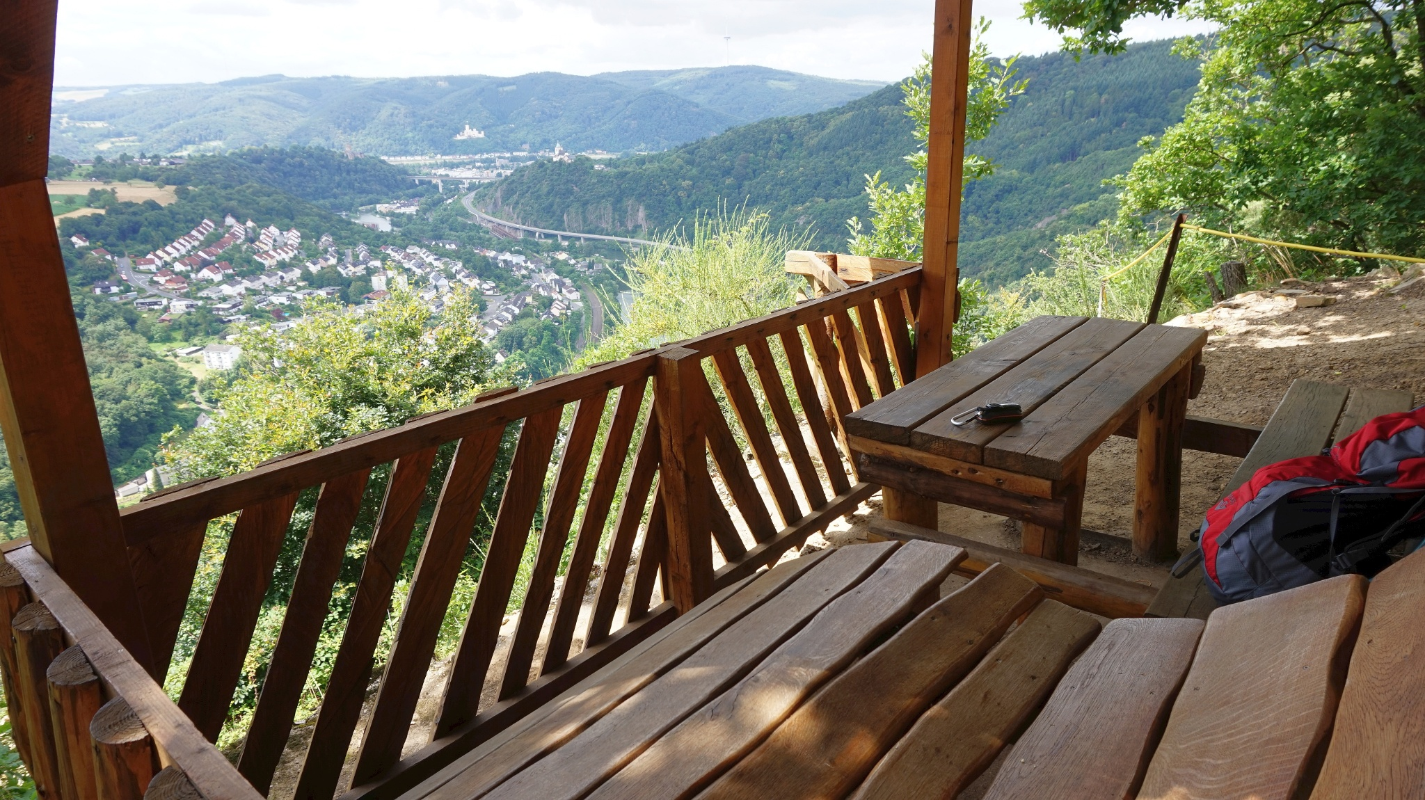 Blick vom Aussichtspunkt Mehrsberg (Rhein-Lahn-Kreis, Deutschland) in Richtung Südwesten durch das Lahntal auf Lahnstein und Schloss Stolzenfels.